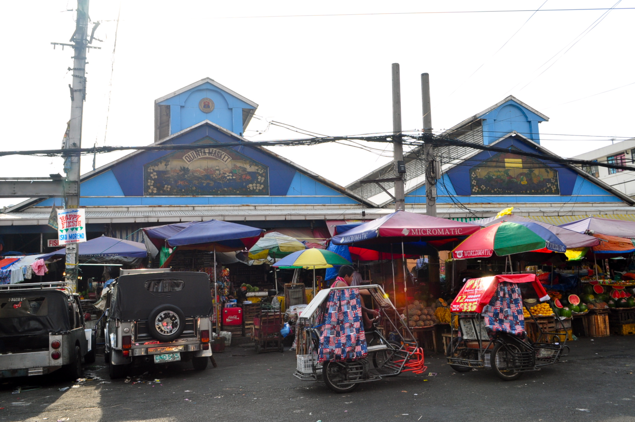 Quinta Market in Manila, Philippines